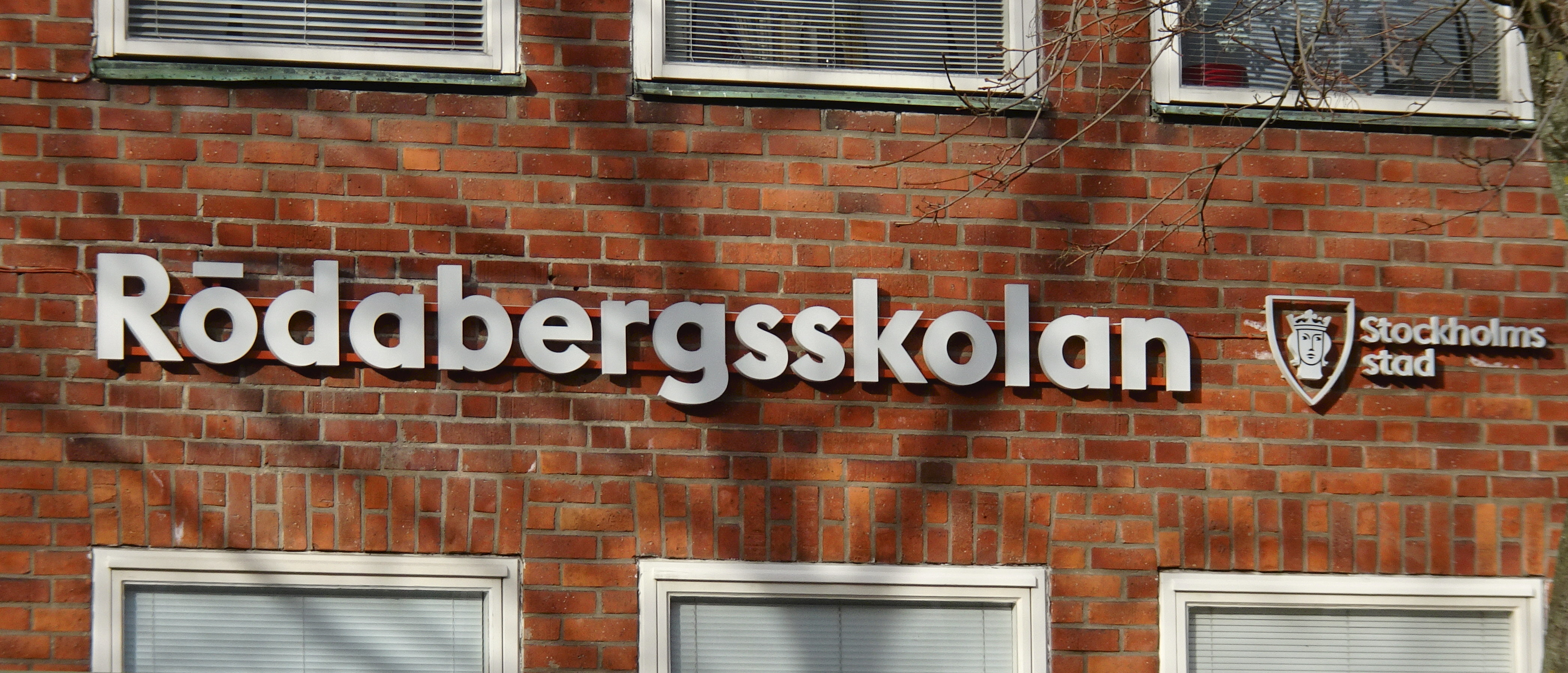 Rödabergsskolan